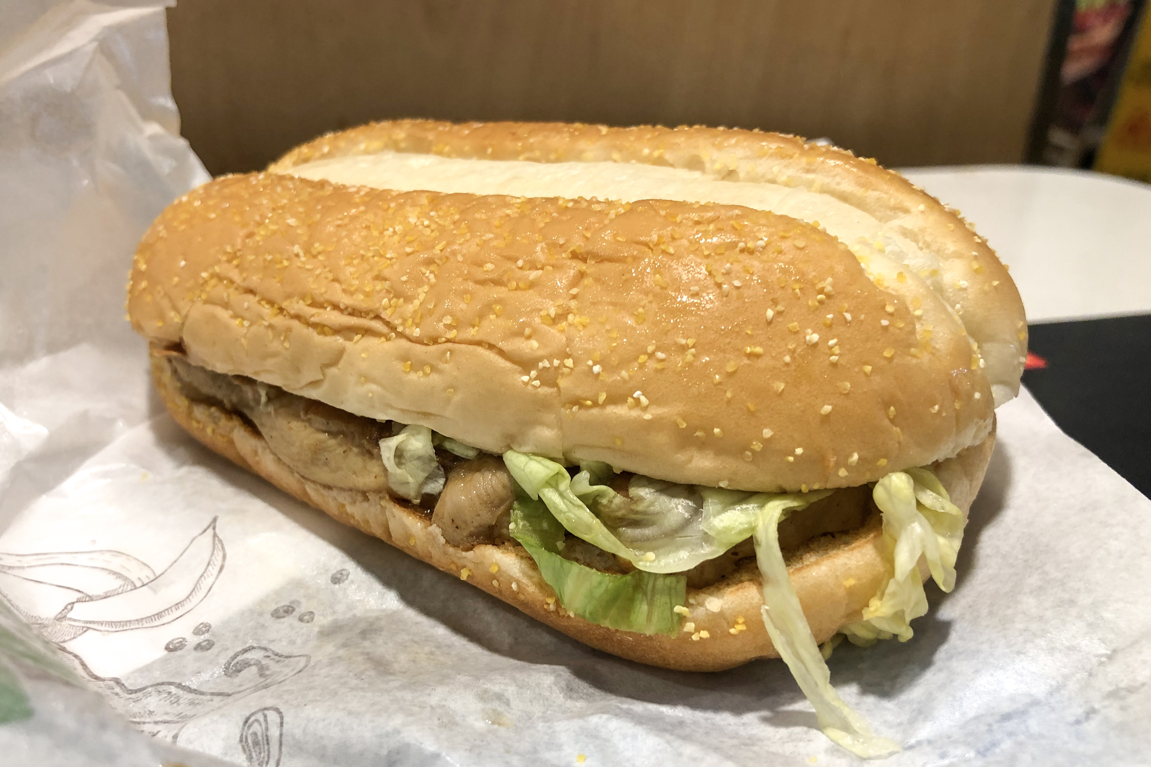 北京麦当劳东直门外餐厅（公联枢纽一层西侧）的风味板烧鸡腿堡